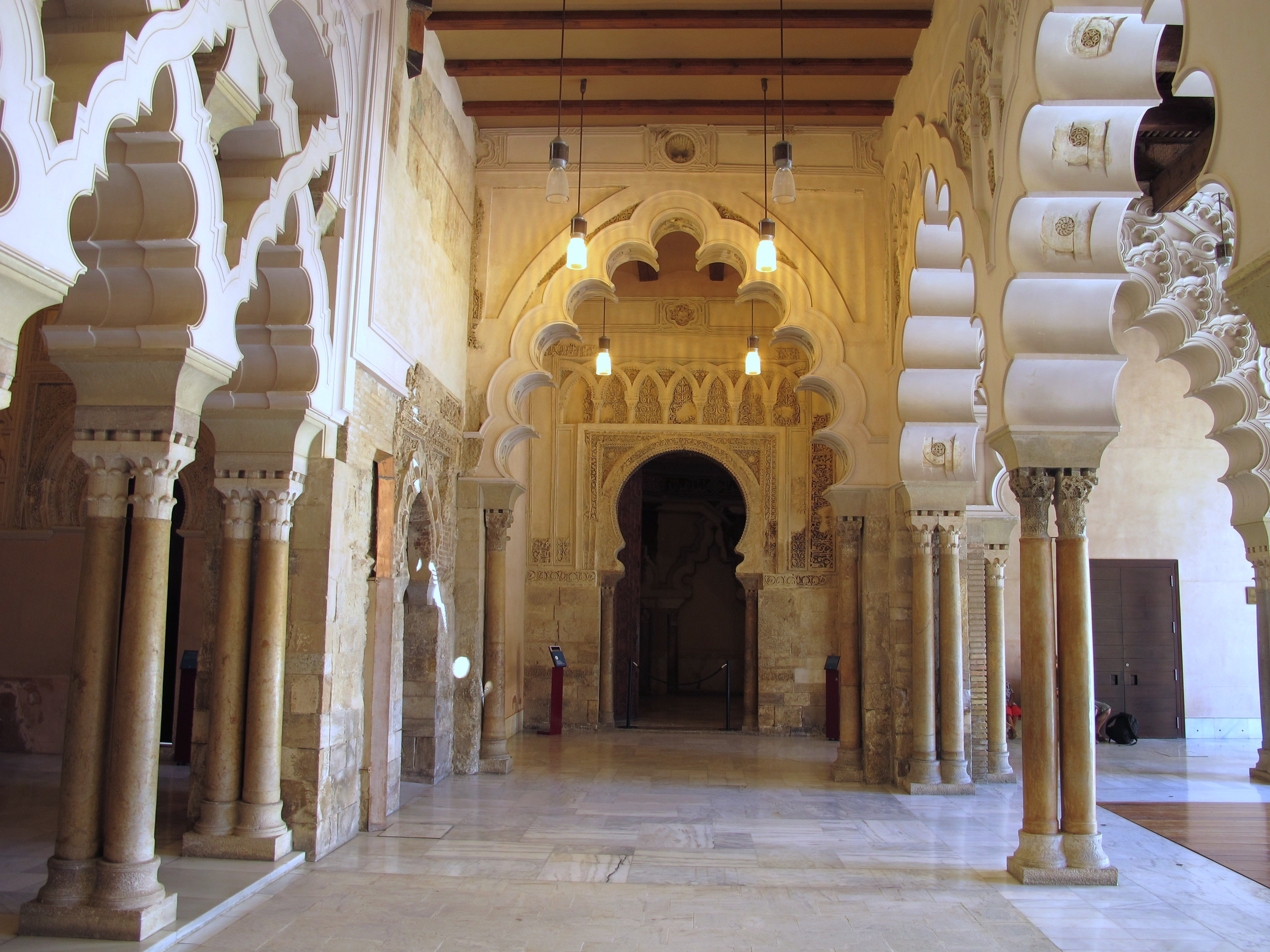 Zaragoza (Aragon, Spanien): Stadtpalast "La Aljafería", Erdgeschoß, Teil des arabischen Palastes